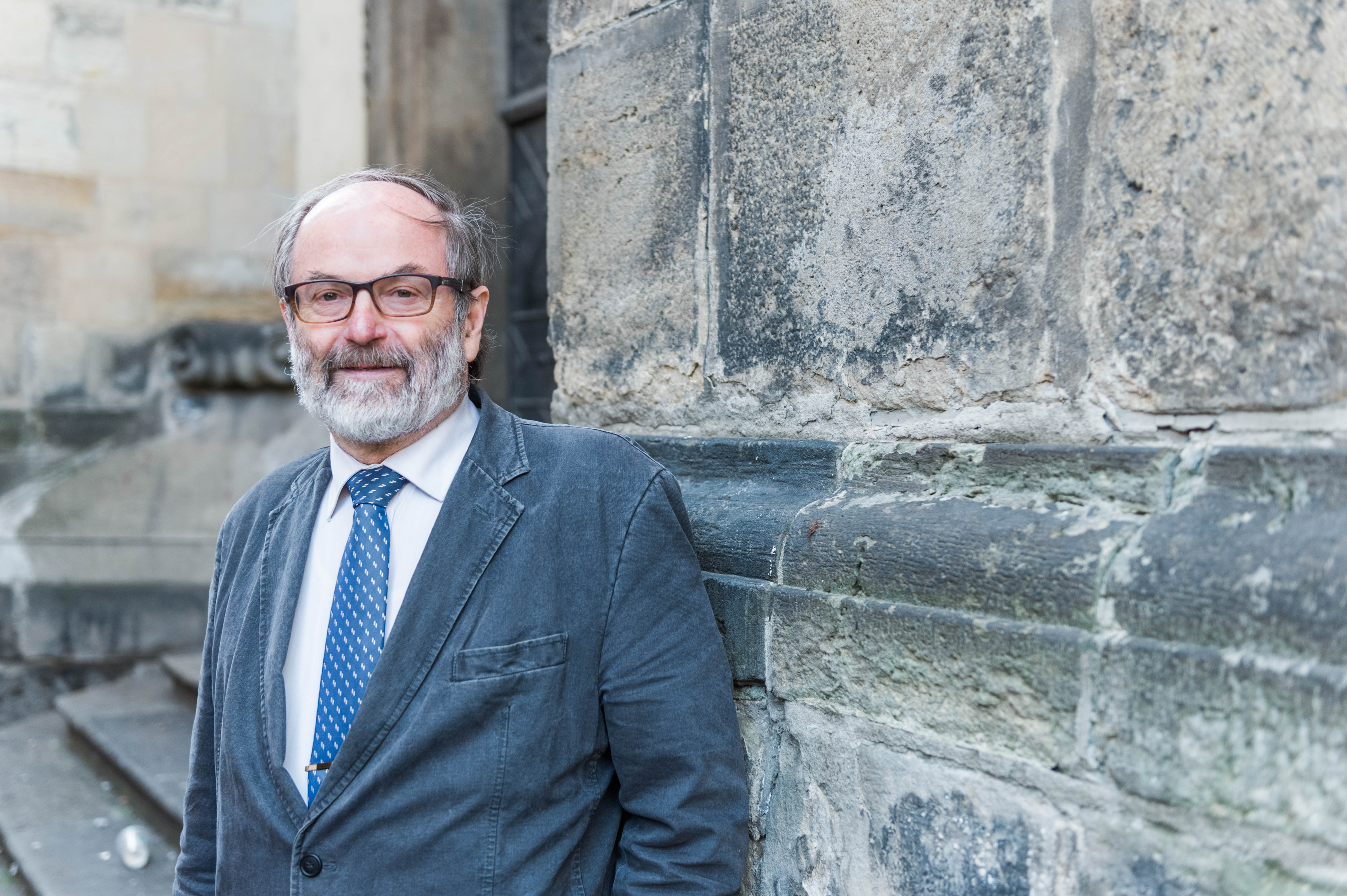 Petr Sommer (* 30. listopadu 1949 Rakovník) je český historik a archeolog, ředitel Centra medievistických studií Akademie věd České republiky a Univerzity Karlovy v Praze. Odborně se zabývá církevní archeologií a středověkou duchovní kulturou.